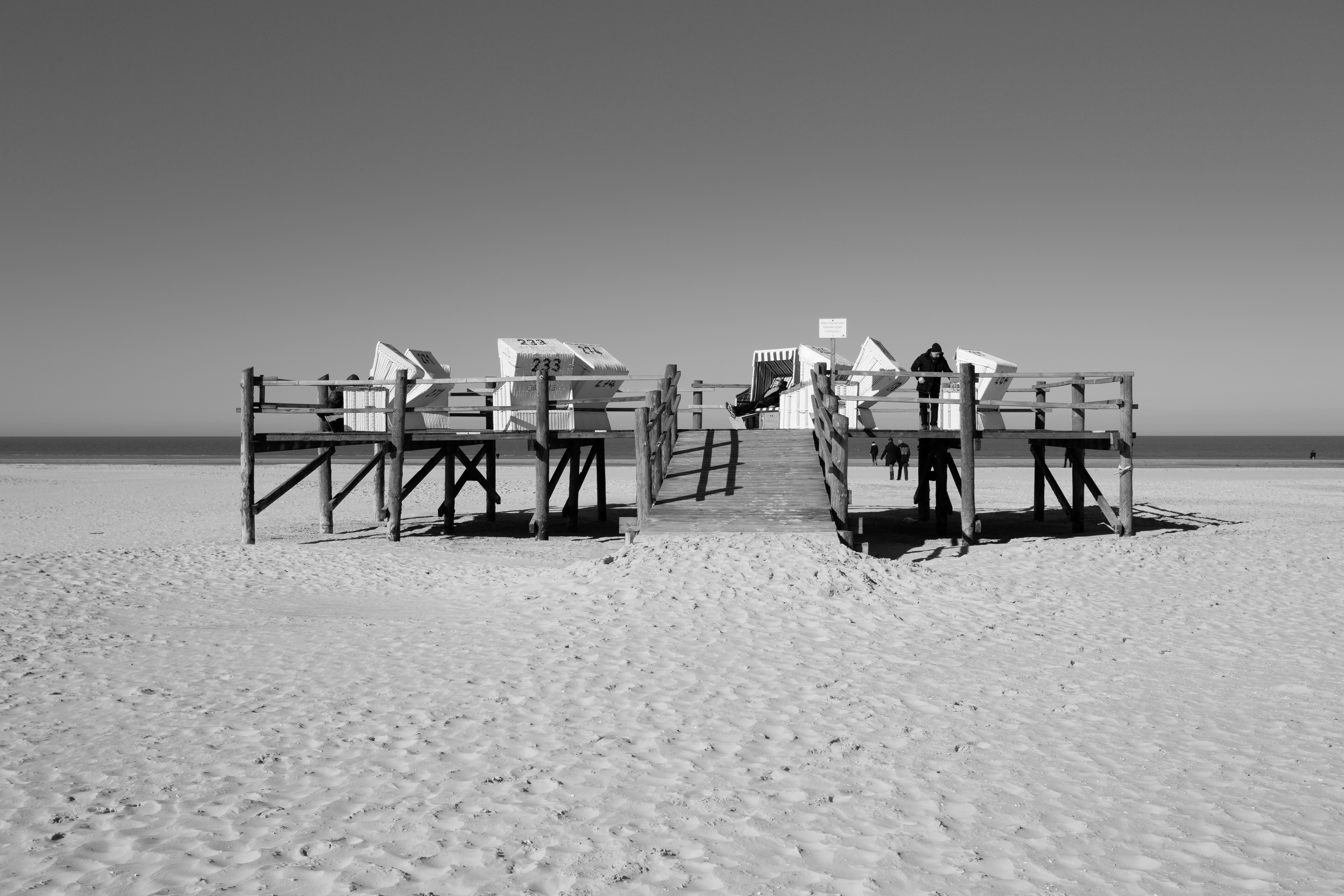 Strandkorbpodest in Sankt-Peter-Ording, Schleswig-Holstein, Deutschland.